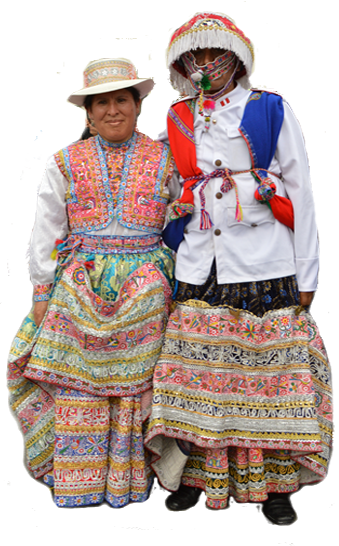 Dentro del Valle del Colca,hay tres culturas marcadas que se diferencian en los estilos de traje y baile en la interpretación de la danza de "Wititi" (término aymara),"Witiwiti" (término Quechua).